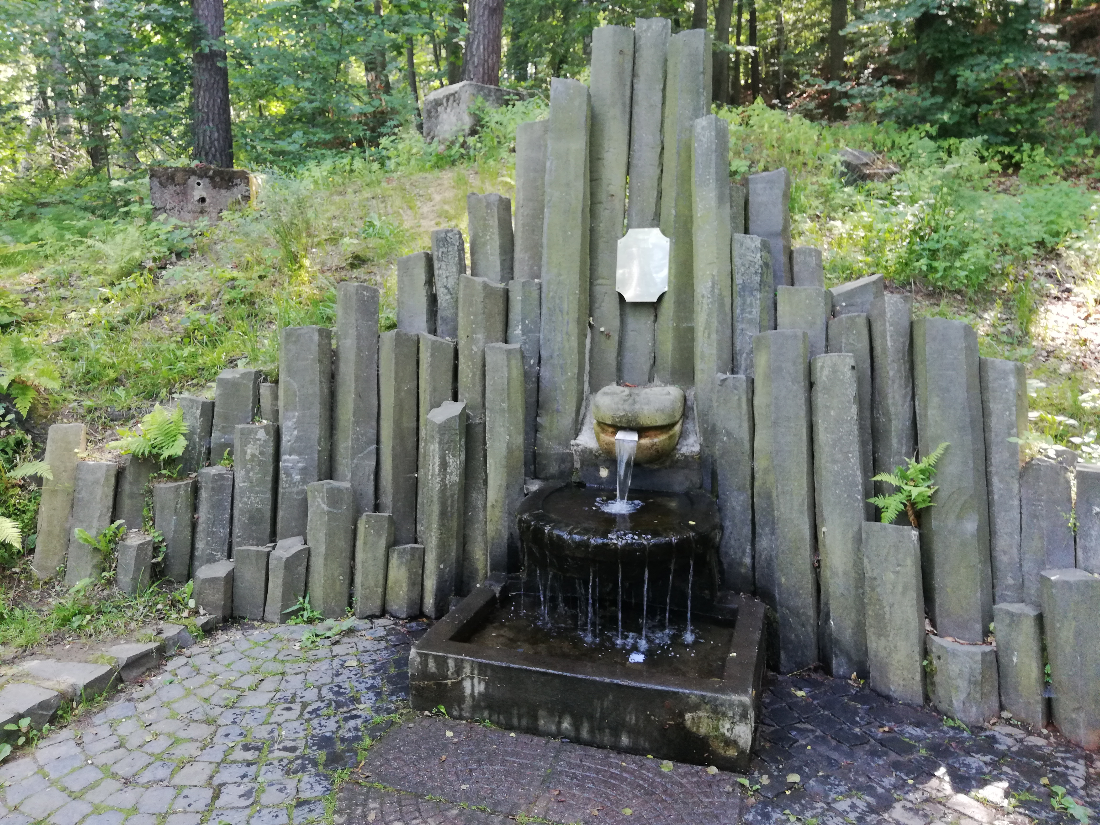 Pramen Žába (původně nazývaný „Rudolf Liebischguelle.“) je volně přístupný pramen v lesoparku na okraji města Kamenický Šenov na severu Čech v Libereckém kraji, v okrese Česká Lípa.